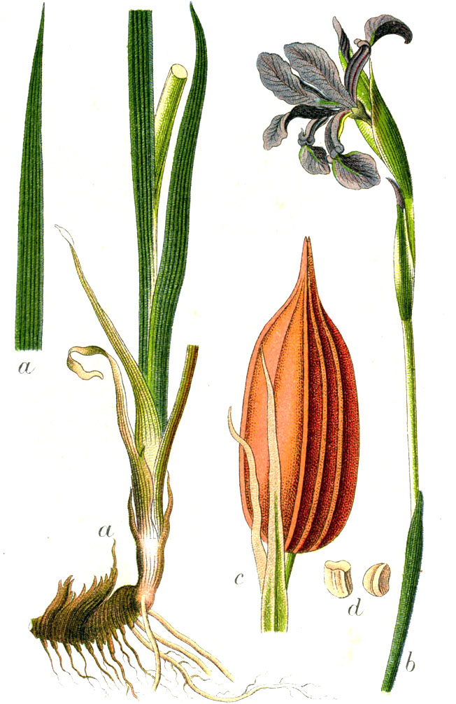 Iris spuria L. Original Caption Mainzer Schwertlilie, Iris spuria